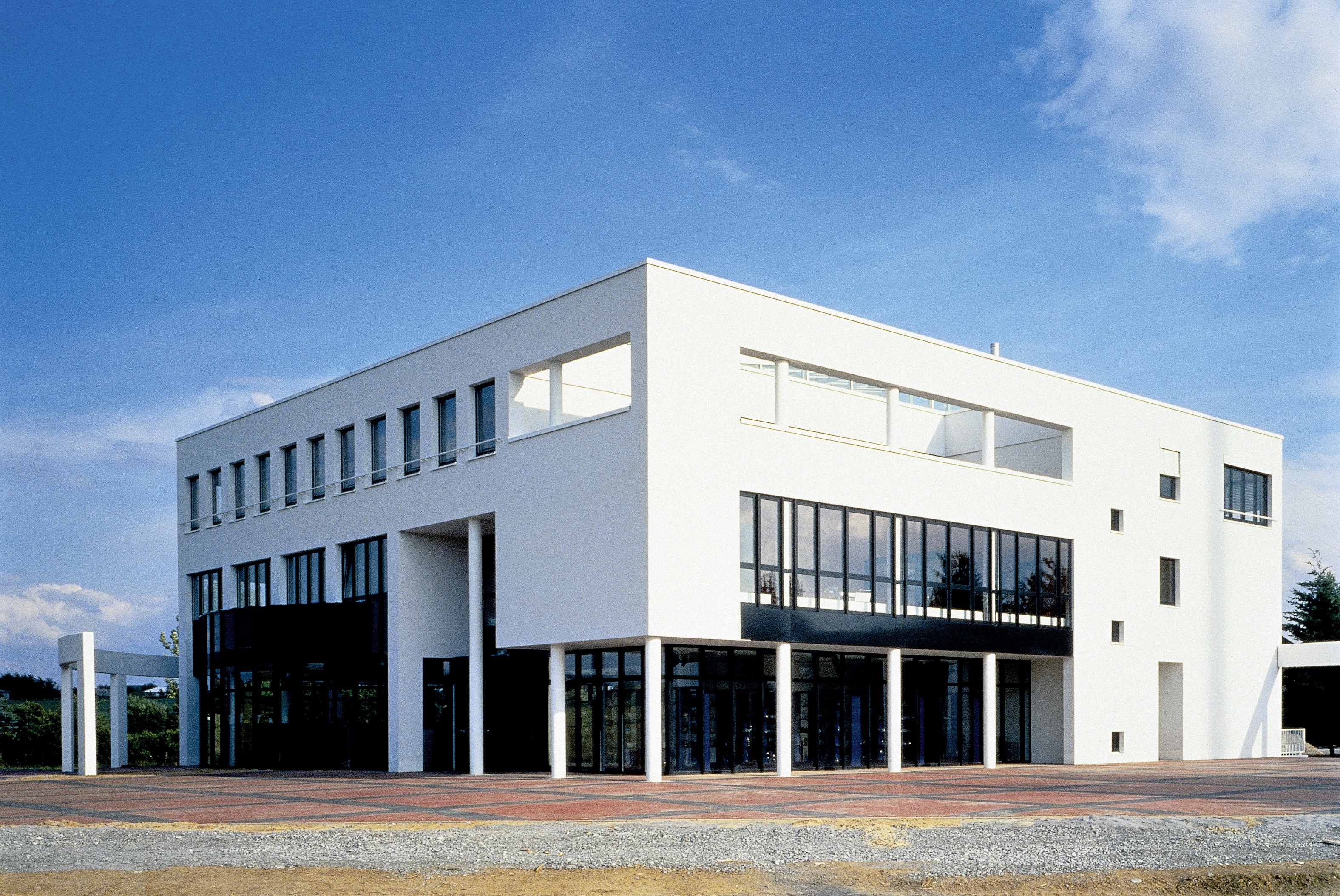 Hauptverwaltung Ritzenhoff, 1993